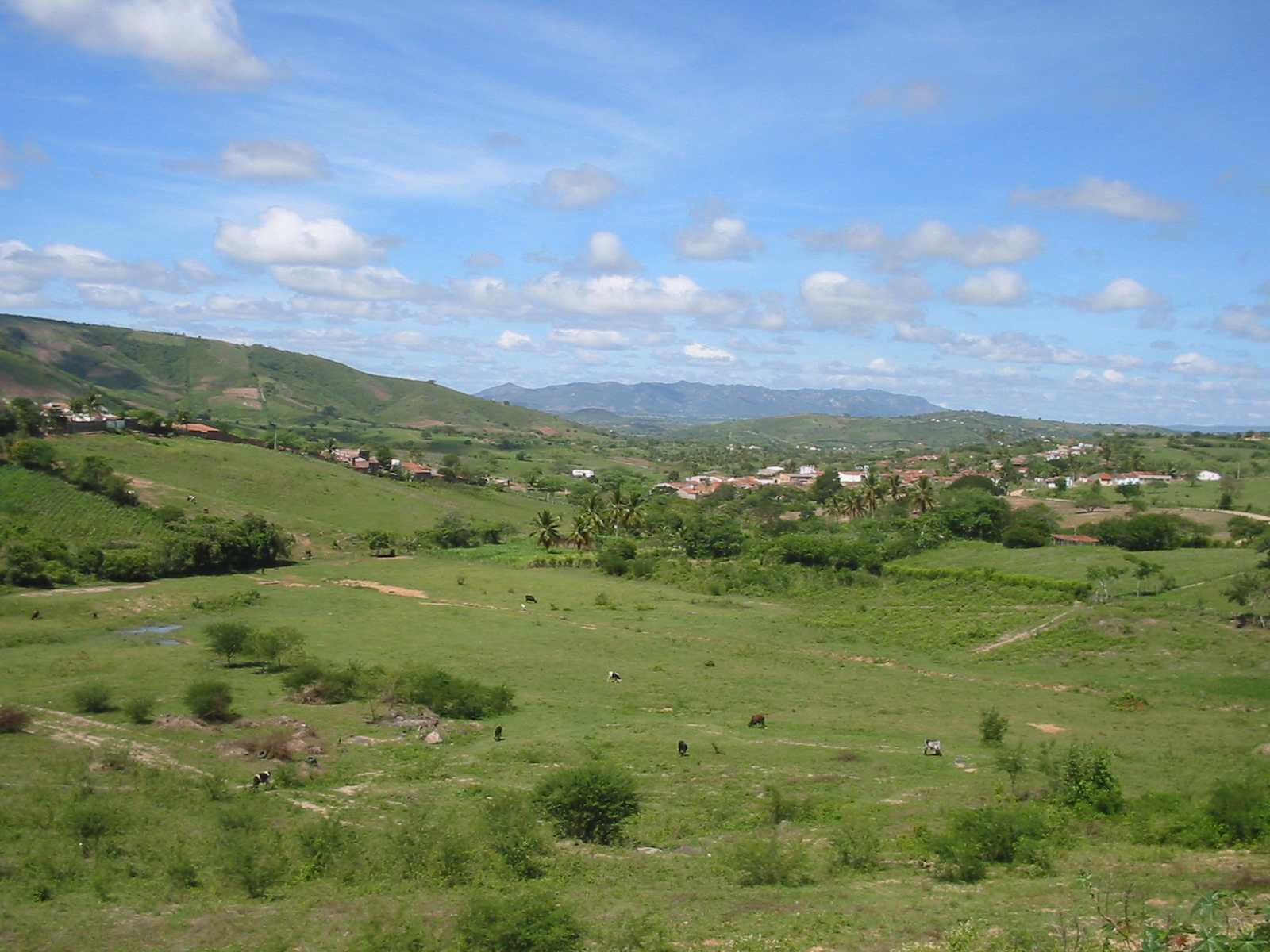 Cumaru (Pernambuco), Brasil. Zona rural. Cumaru (Pernambuco), Brazil. Rural area.